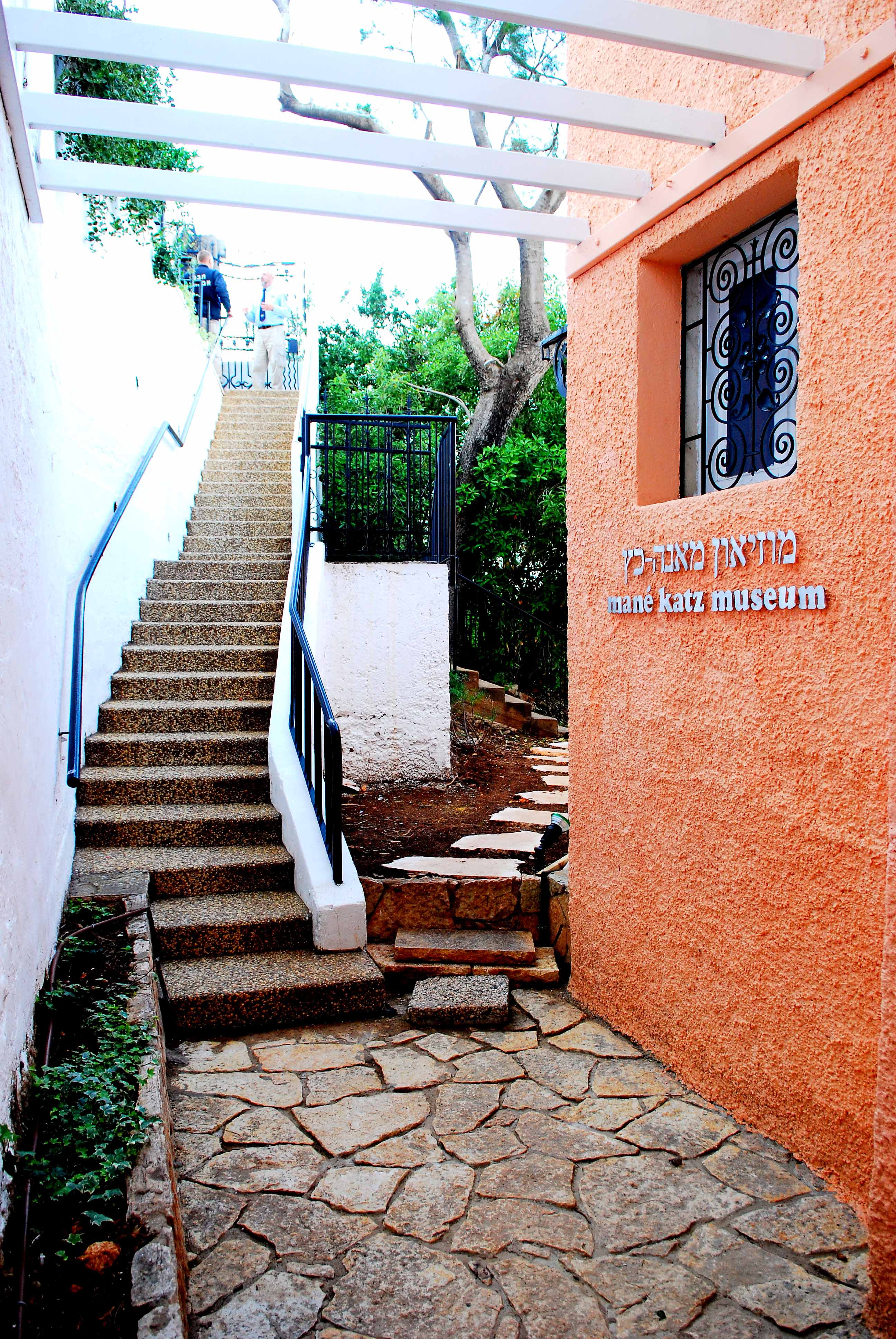 מאנה כץ